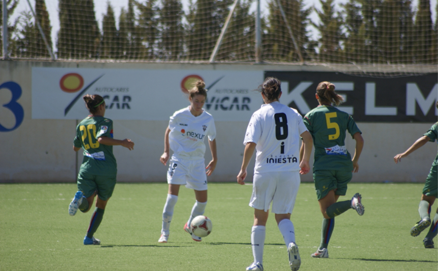 Encuentro entre el equipo Fundación Albacete Nexus y la U.D. Levante, partido disputado en la Ciudad Deportiva del Albacete Balompié el 23 de septiembre de 2013